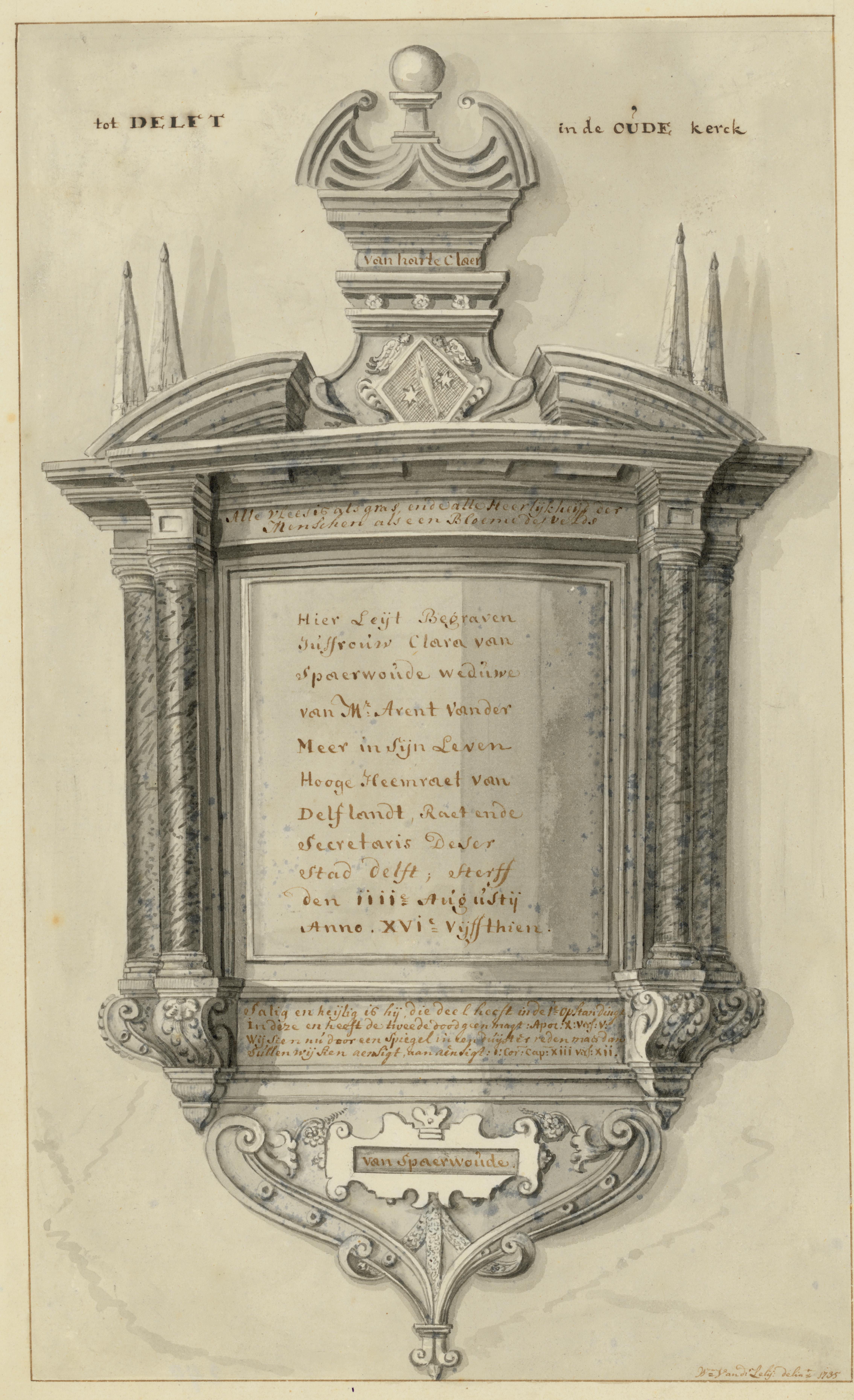 tekening in pen en inkt van de epithaaf van Clara van Sparwoude in de Oude Kerk te Delft , getekend, gesigneerd en gedateerd door Willem van der Lelij, 1735